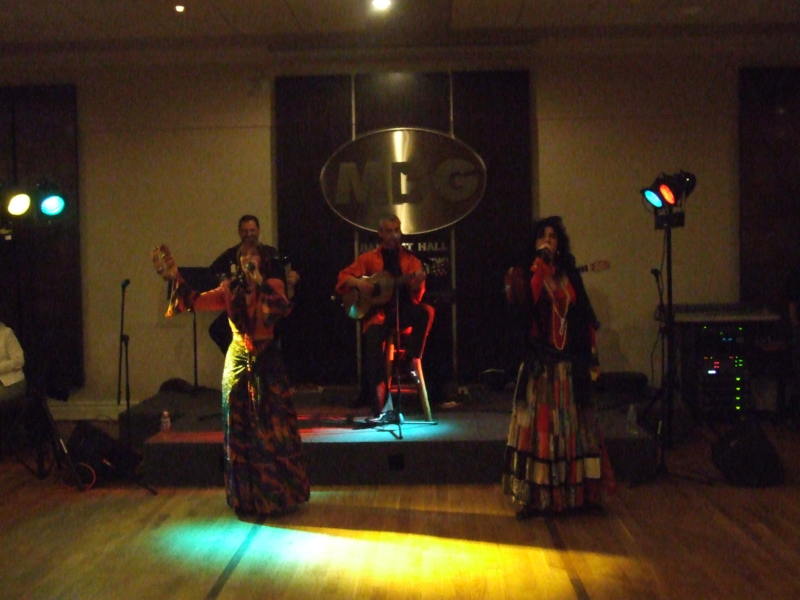 Odjila, Canada 2008.